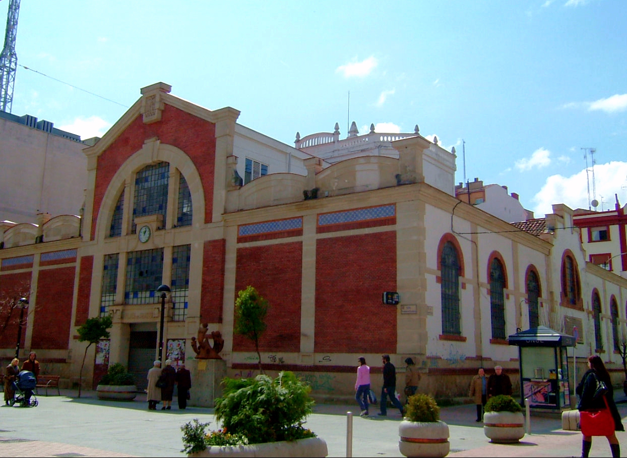 Plaza de Abastos de Miranda de Ebro - España